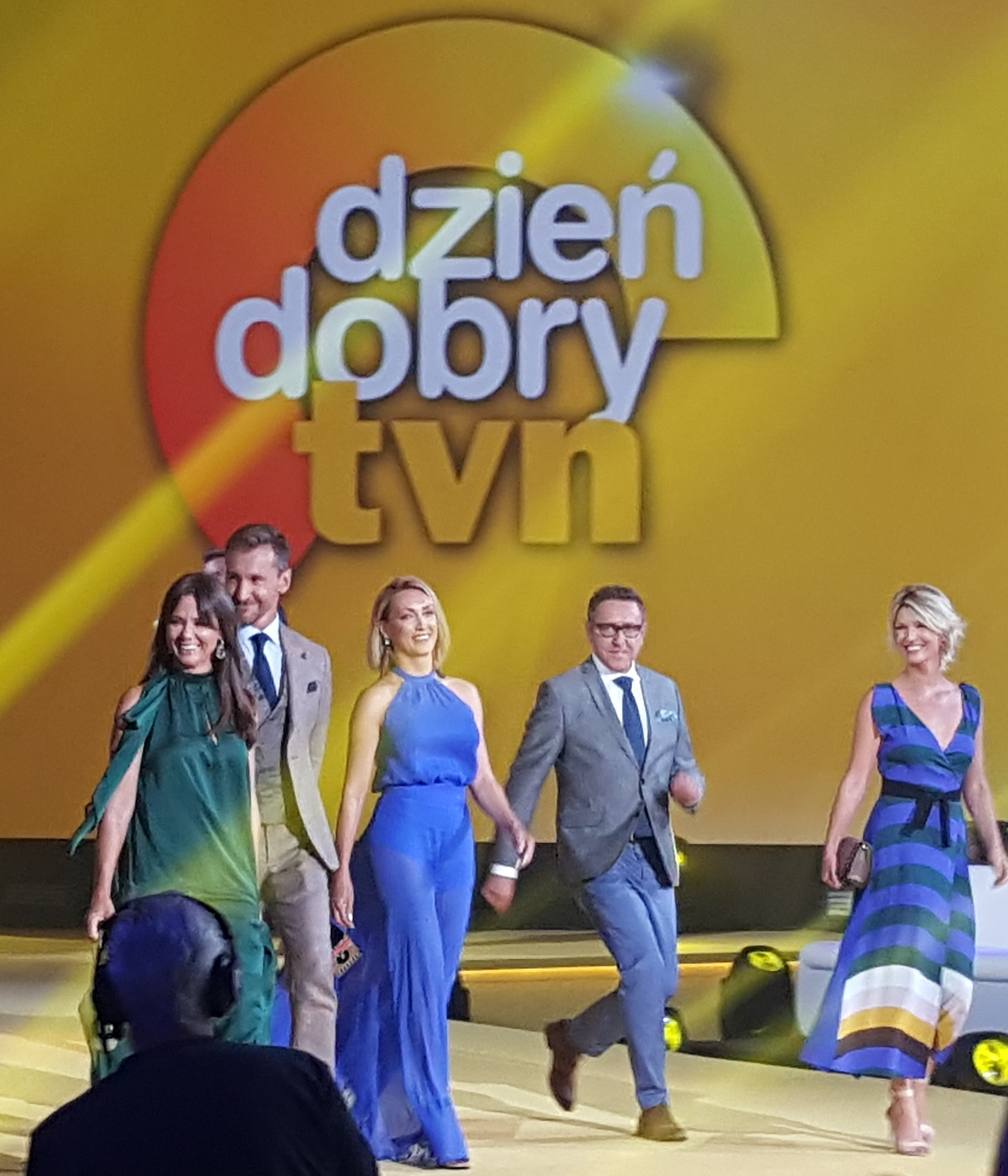 Prowadzący program "Dzień Dobry TVN": Kinga Rusin, Piotr Kraśko, Anna Kalczyńska, Andrzej Sołtysik i Magda Mołek na jesiennej konferencji ramówkowej TVN w sierpniu 2017 roku.